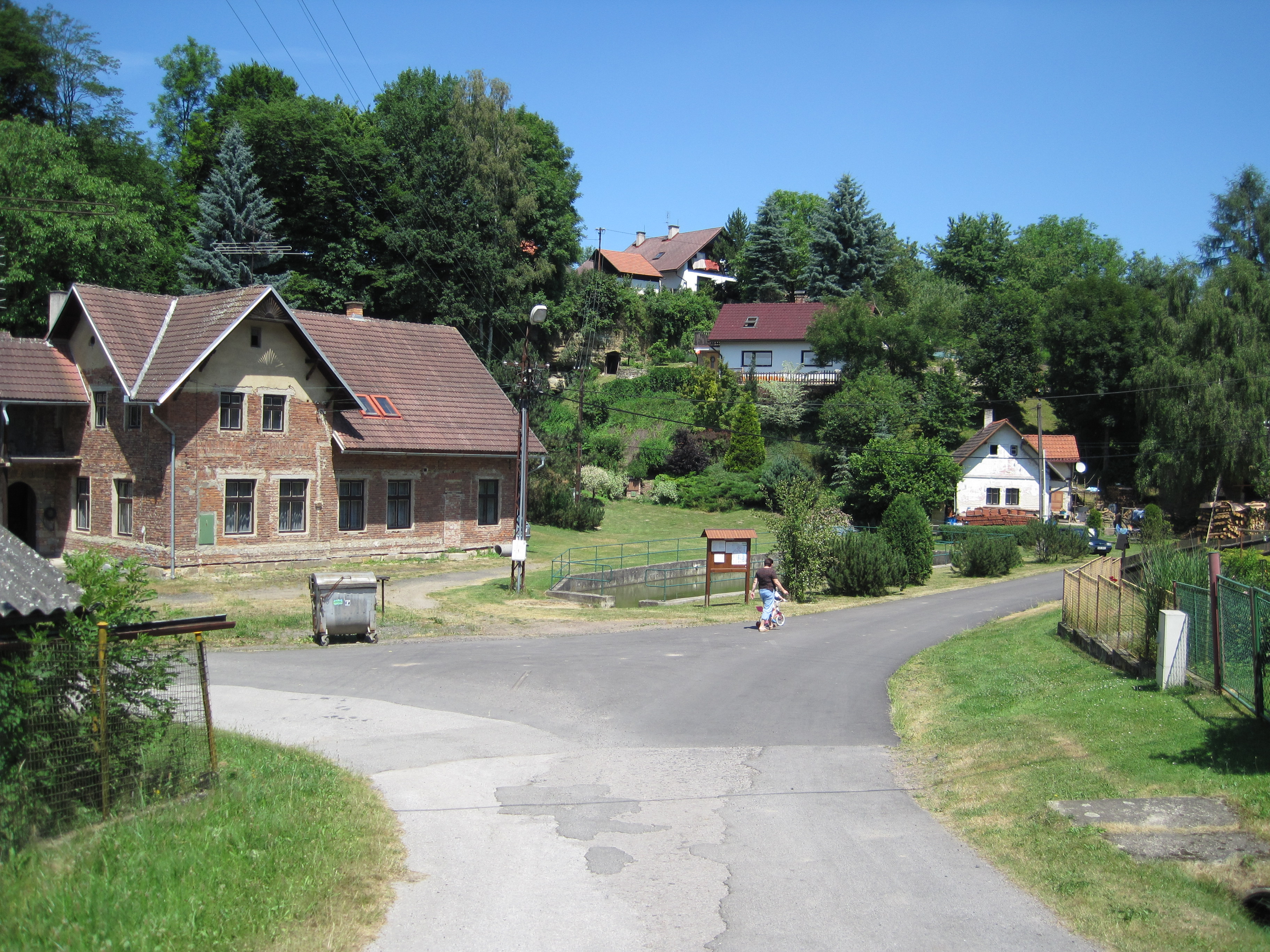 Meziluží (v Českém ráji) - střed vsi s čp. 10